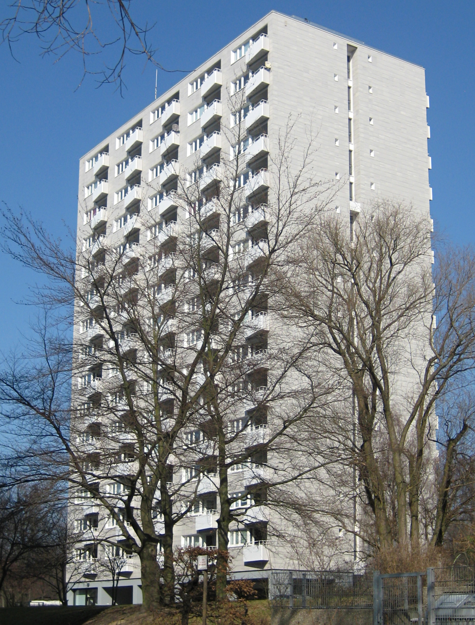 Wohnstadt am Ruhwaldpark Spandauer Damm 217